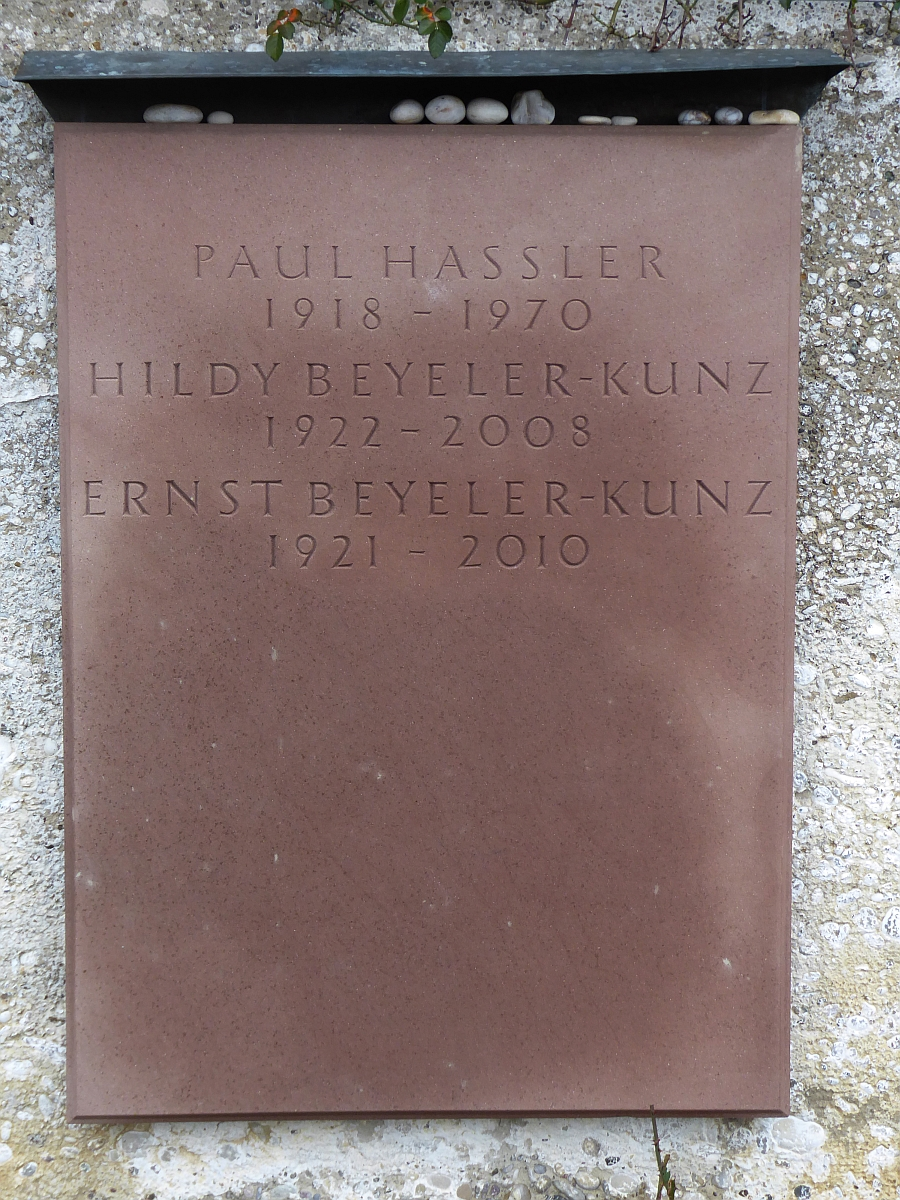 Hildy Beyeler-Kunz (1922–2008), Kunstsammlerin, Beyeler-Stiftung, Fondation Beyeler, Grab auf dem Friedhof Hörnli, Riehen, Basel-Stadt